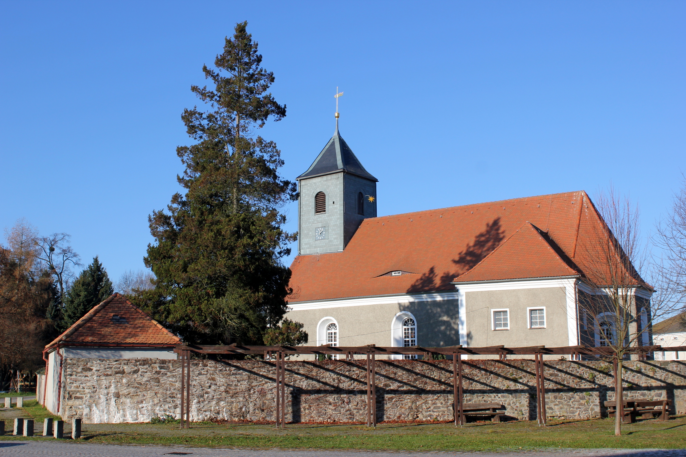 Hornjoserbsce: Hućinjanska ewangelska cyrkej.